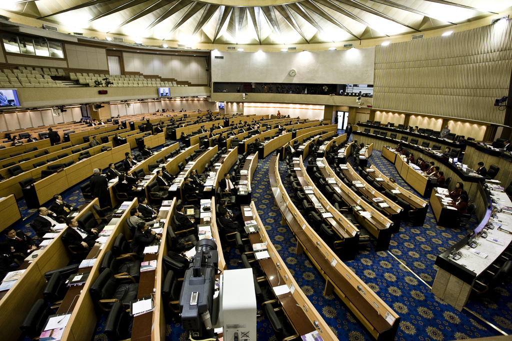 การประชุมสภาผู้แทนราษฎร ณ อาคารรัฐสภา ถนนอู่ทองใน 20สิงหาคม2552 (The Official Site of The Prime Minister of Thailand Photo by พีรพัฒน์ วิมลรังครัตน์)